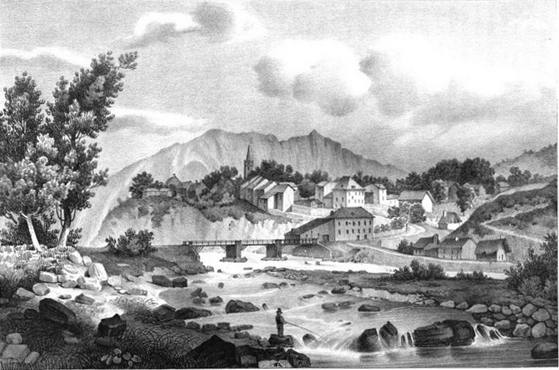 Savines (Hautes-Alpes)